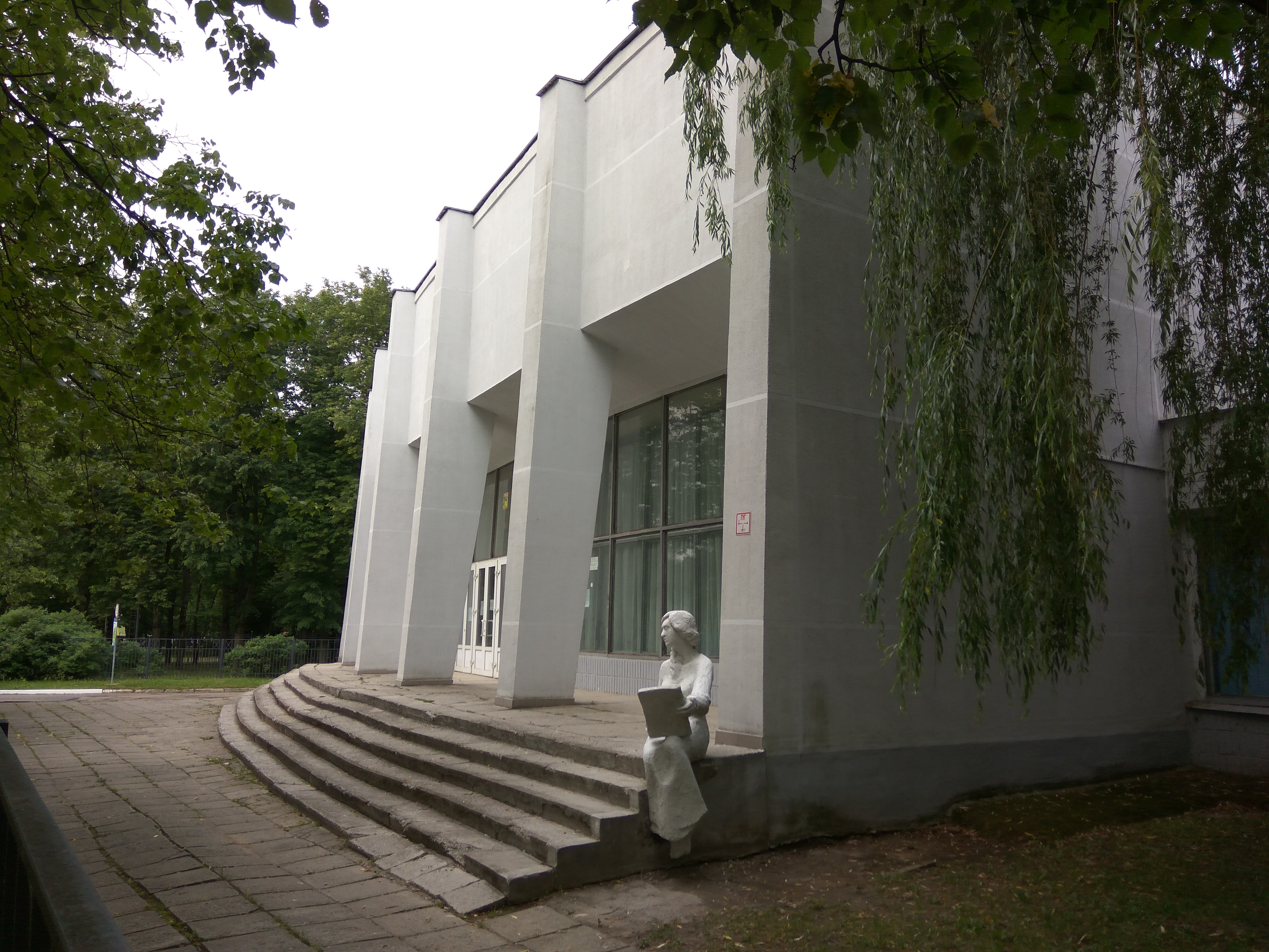 Мінск. Вуліца Макаёнка. Гімназія-каледж мастацтваў імя І. В. Ахрэмчыка